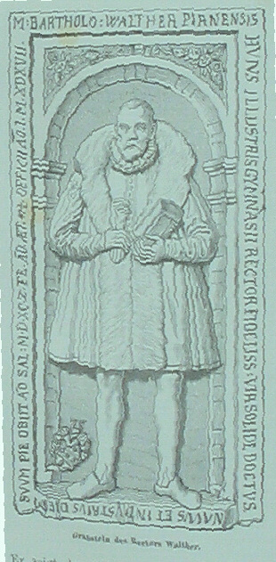 Schulpforta - Rektor Walter - W. Corssen: Alterthuemer und Kunstdenkmale des Cisterzienserklosters St. Marien und der Landesschule zur Pforte, Halle 1868